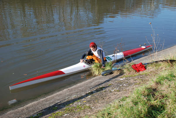 Kajak připravený k vyplutí